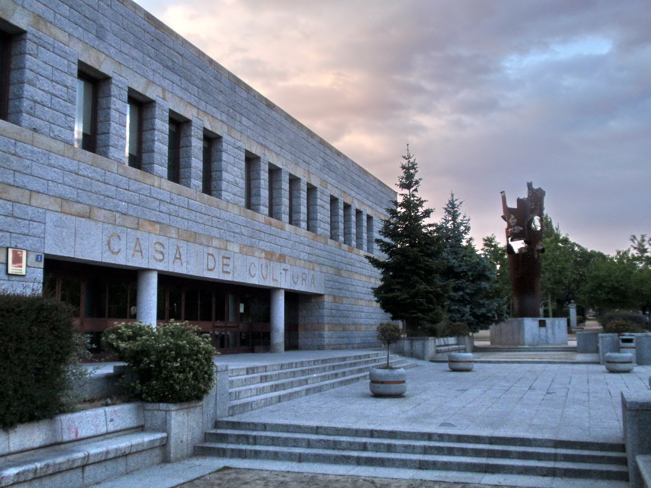 Torrelodones. Casa de Cultura.